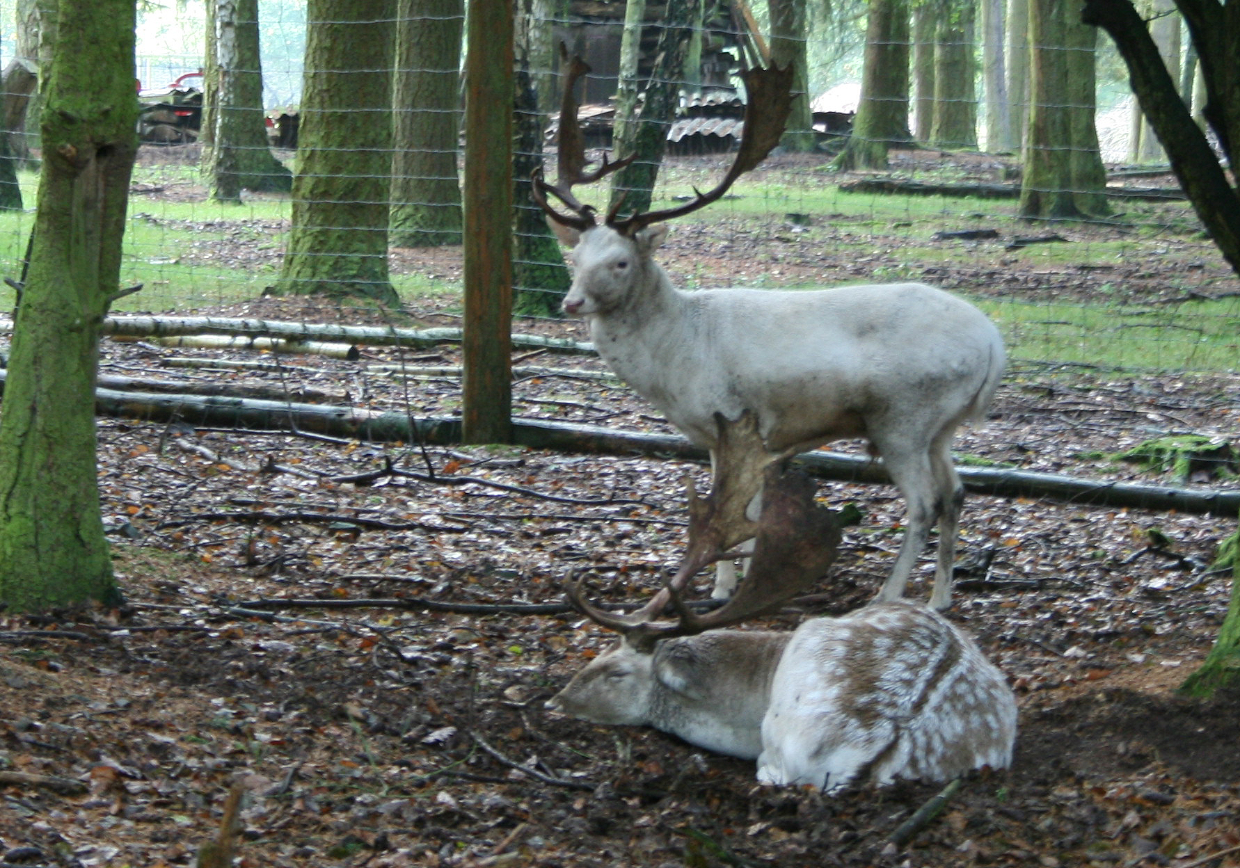 Weißer Damhirsch, Wildpark Edersee